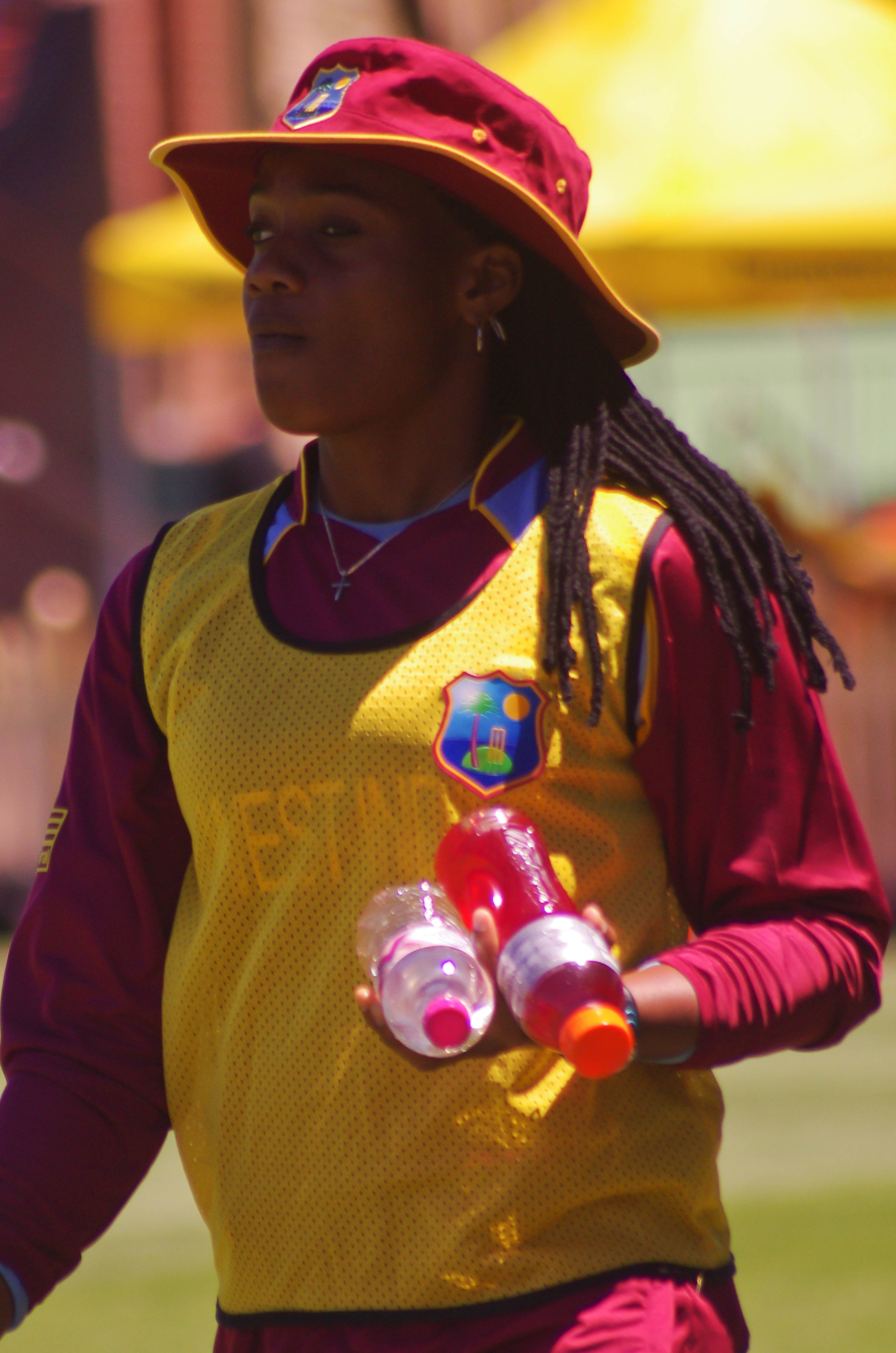 SUBRINA MUNROE